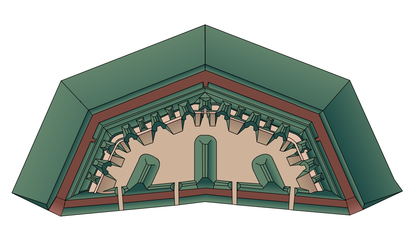 Земляной профиль форта (1880 год).